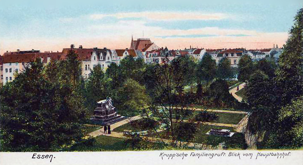 Friedhof am Kettwiger Tor in Essen, Familienfriedhof der Industriellen Krupp (nicht mehr existent, schließlich 1955 innerstädtisch überbaut; links das Grabmal von Alfred Krupp, rechts das seiner Frau Bertha Krupp geb. Eichhoff)